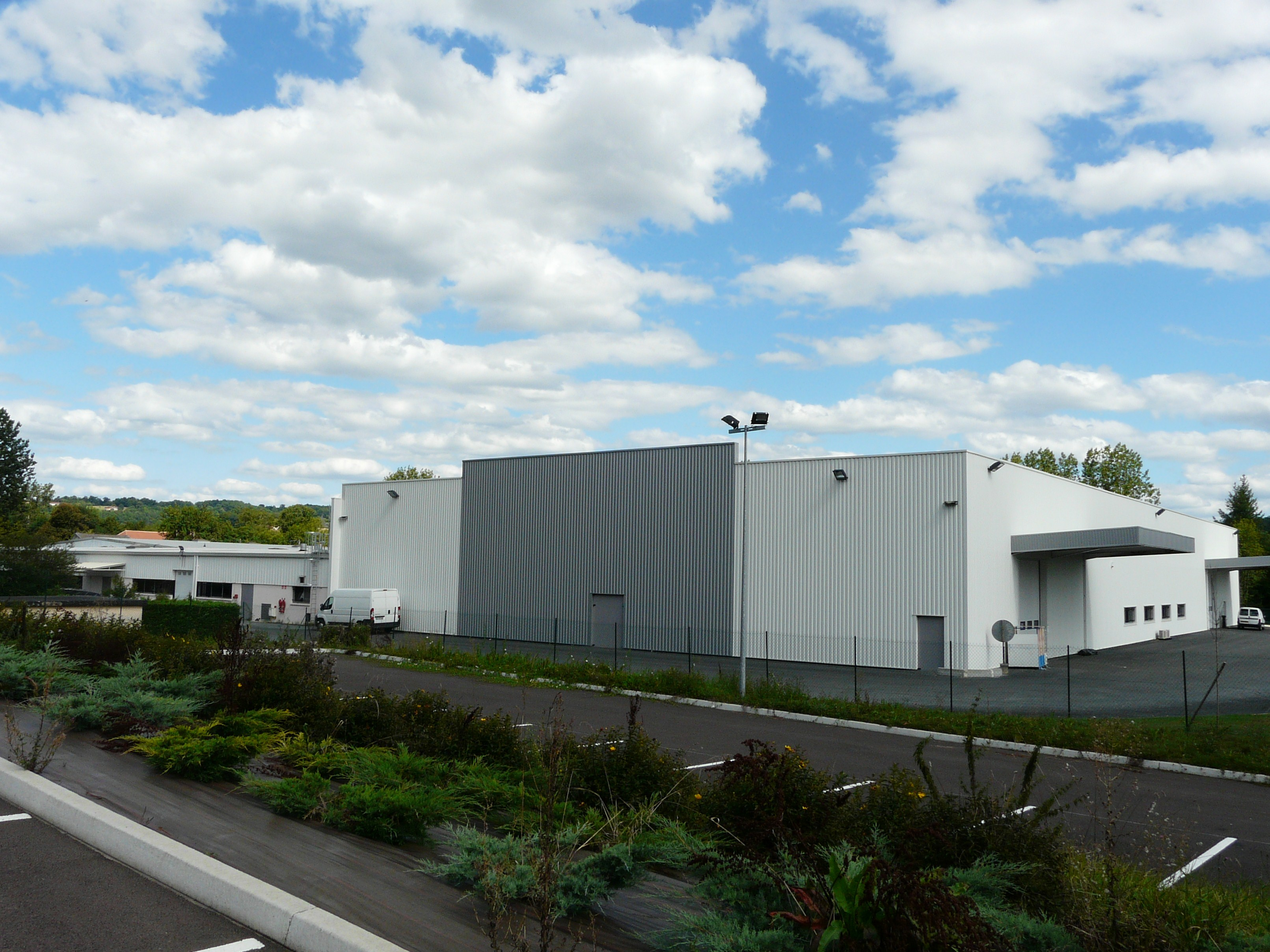 L'usine Repetto à Saint-Médard-d'Excideuil, Dordogne, France.